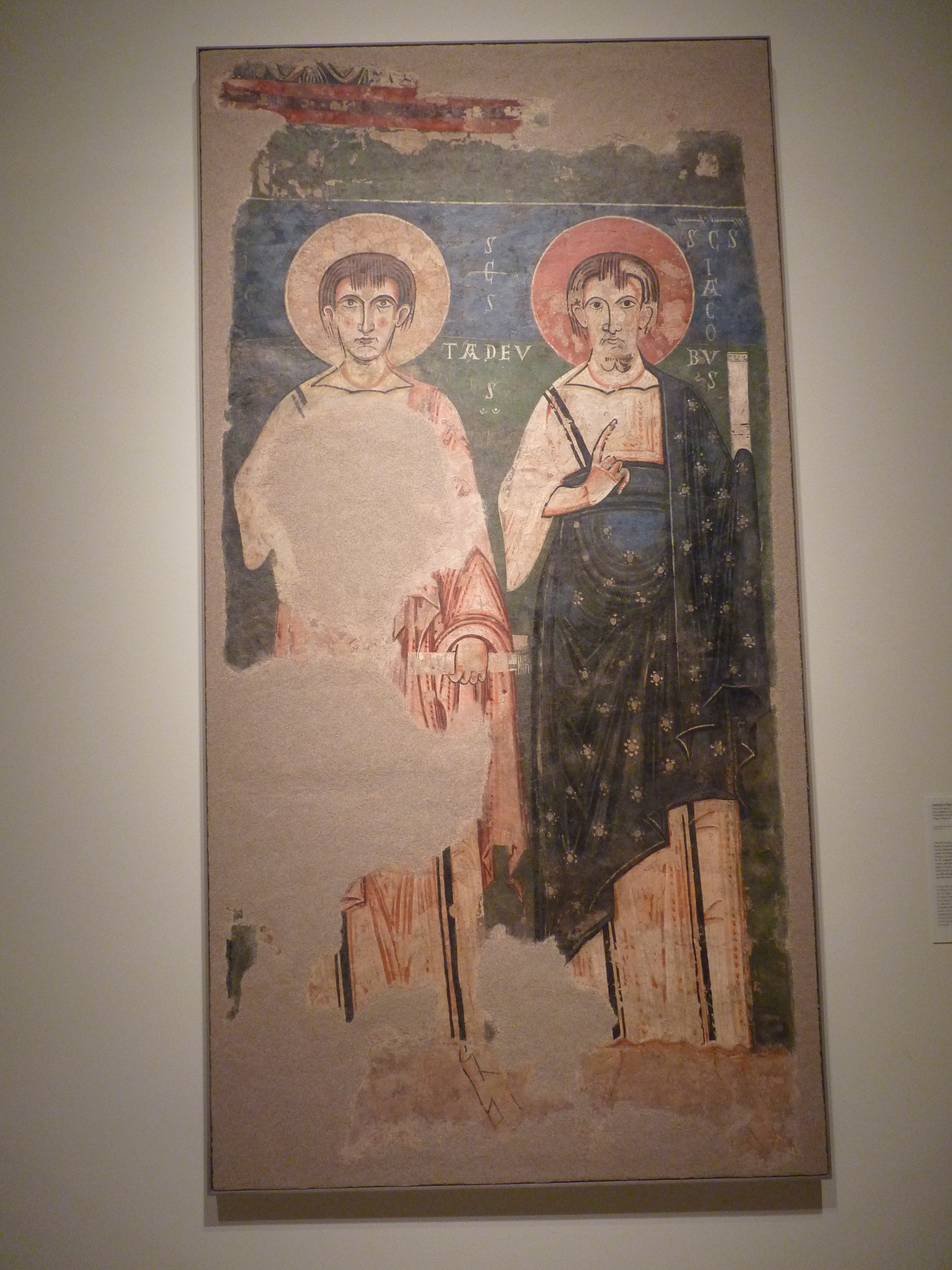 Apòstols d'Àger: Tadeu i Jaume